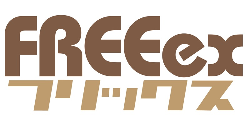 FREEexのロゴです